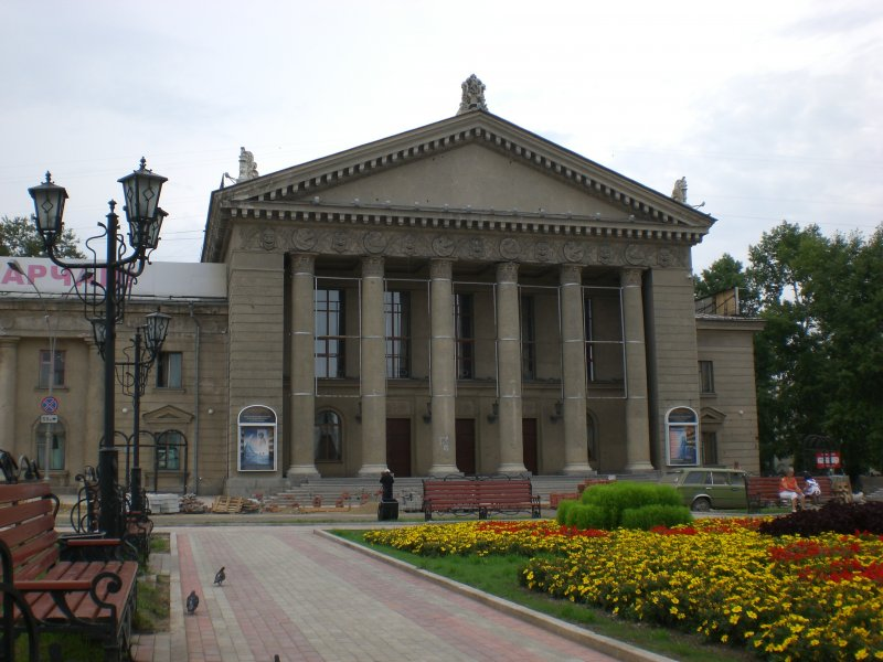 Здание, в котором сейчас располагается театр "Чудак"